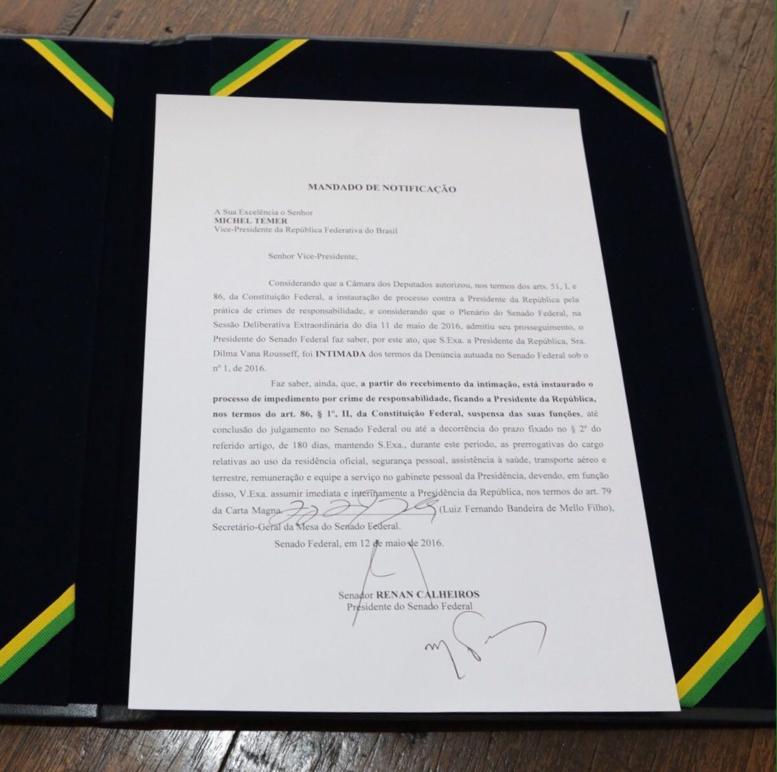 12/05/2016 - Notificação de posse como presidente interino encaminhada pelo Senado